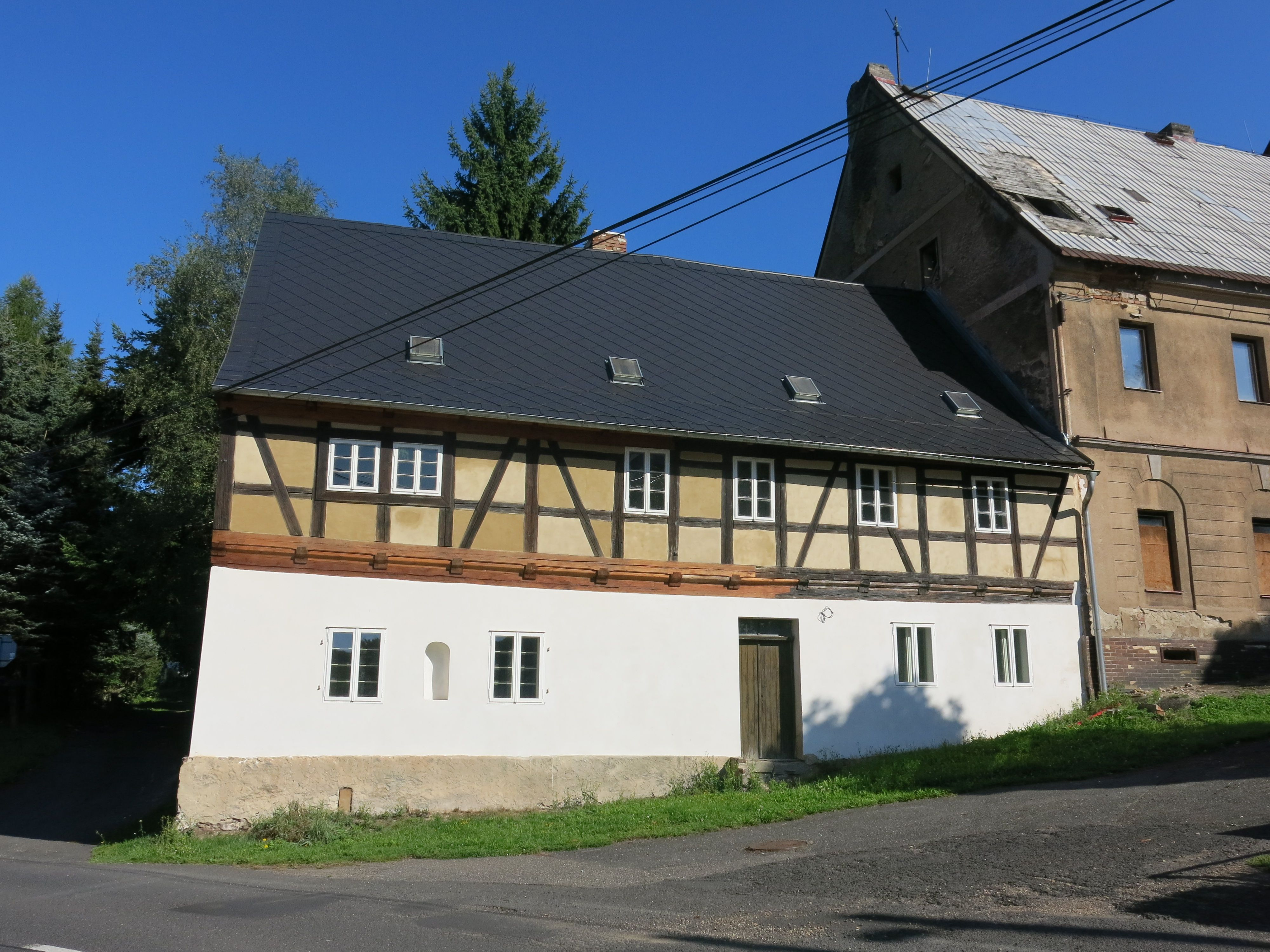 Usedlost čp. 147, Mikulov 147, Mikulov (okres Teplice).